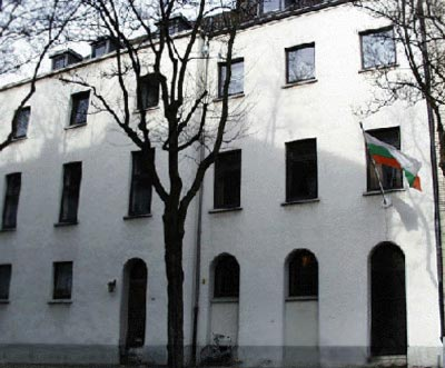 Haus der K.D.St.V._Bergland_(Freiberg)_Aachen des Architekten Kuno Kamphausen; Anfang der 1930er Jahre